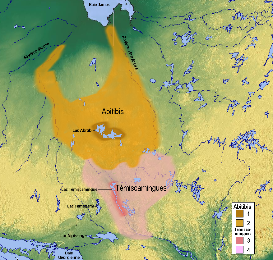 Les Abitibis (Cris) et les Témiscamingues (Algonquins) au XVIIe siècle.1: Territoire d'occupation des Abitibis2: Territoire d'exploitation des Abitibis3: Territoire d'occupation des Témiscamingues4: Territoire d'exploitation des Témiscamingues